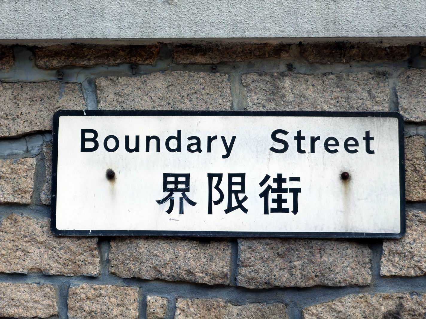 界限街路牌